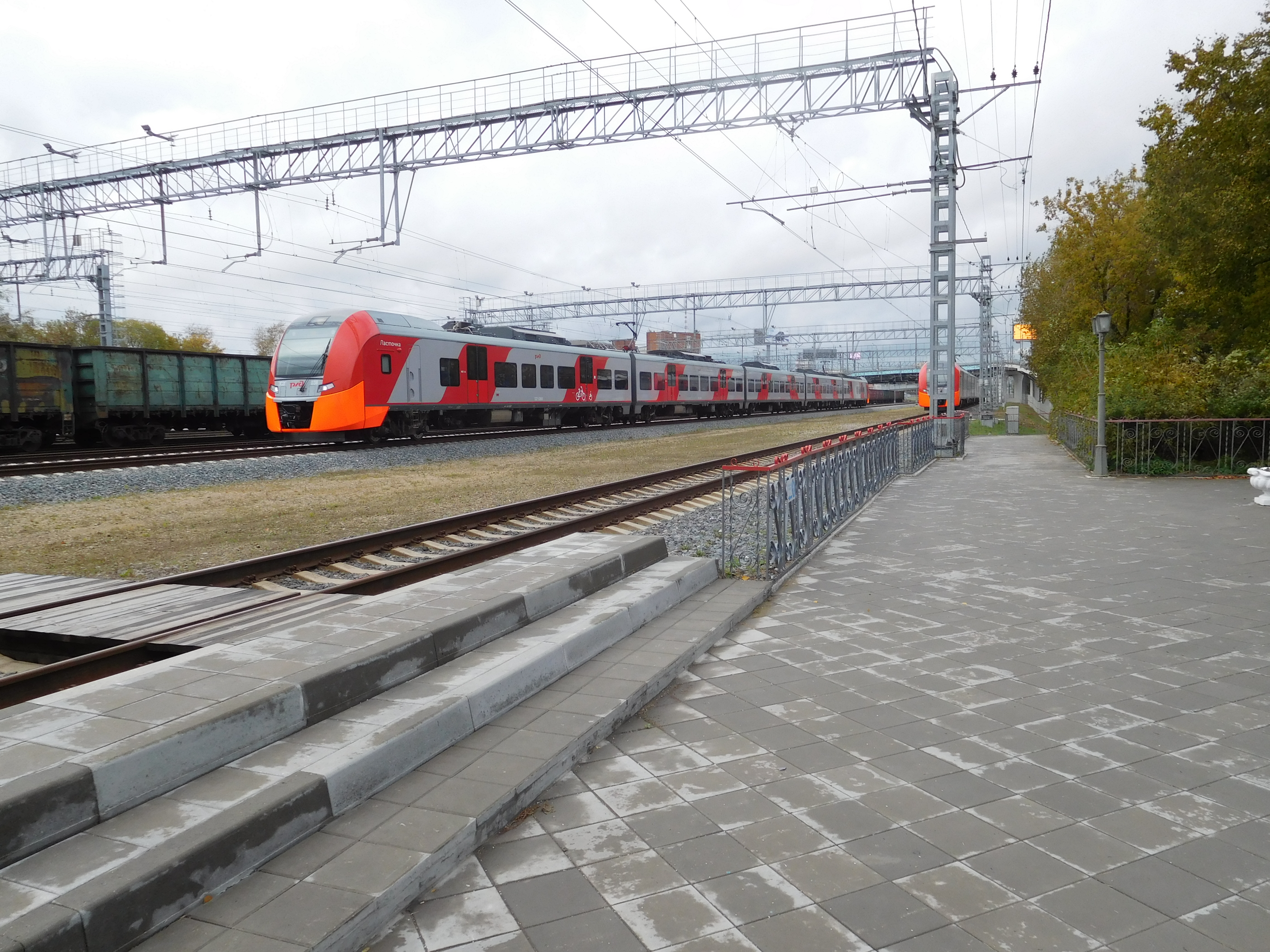 Станция Пресня после реконструкции (2017)